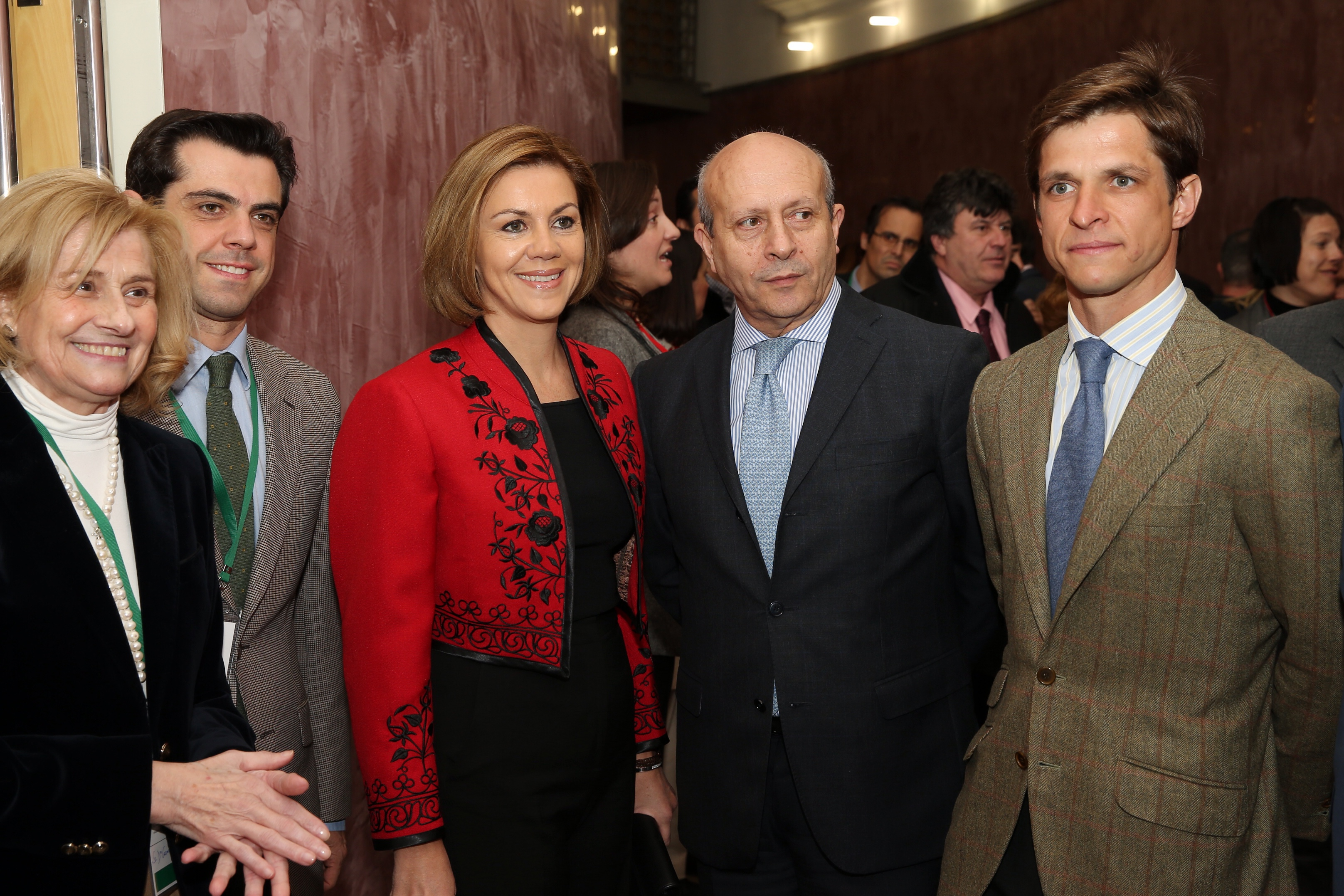 La presidenta del Gobierno de Castilla-La Mancha, María Dolores Cospedal, ha afirmado que “no hay ningún tipo de duda ni jurídica, ni política, ni administrativa, de que la tauromaquia pertenece al pueblo español y tiene que gozar del reconocimiento cultural y protección que le da nuestra normativa”. La presidenta, que ha inaugurado hoy el I Congreso Internacional ‘La Tauromaquia como patrimonio cultural’, un encuentro que comienza hoy en Albacete y que ha contado también con la presencia del ministro de Educación, Cultura y Deporte, José Ignacio Wert, ha destacado el sello taurino que tiene nuestra región. “Castilla-La Mancha es una tierra valiente, que desde hace siglos tiene a la tauromaquia como referente cultural y de su propia historia”.